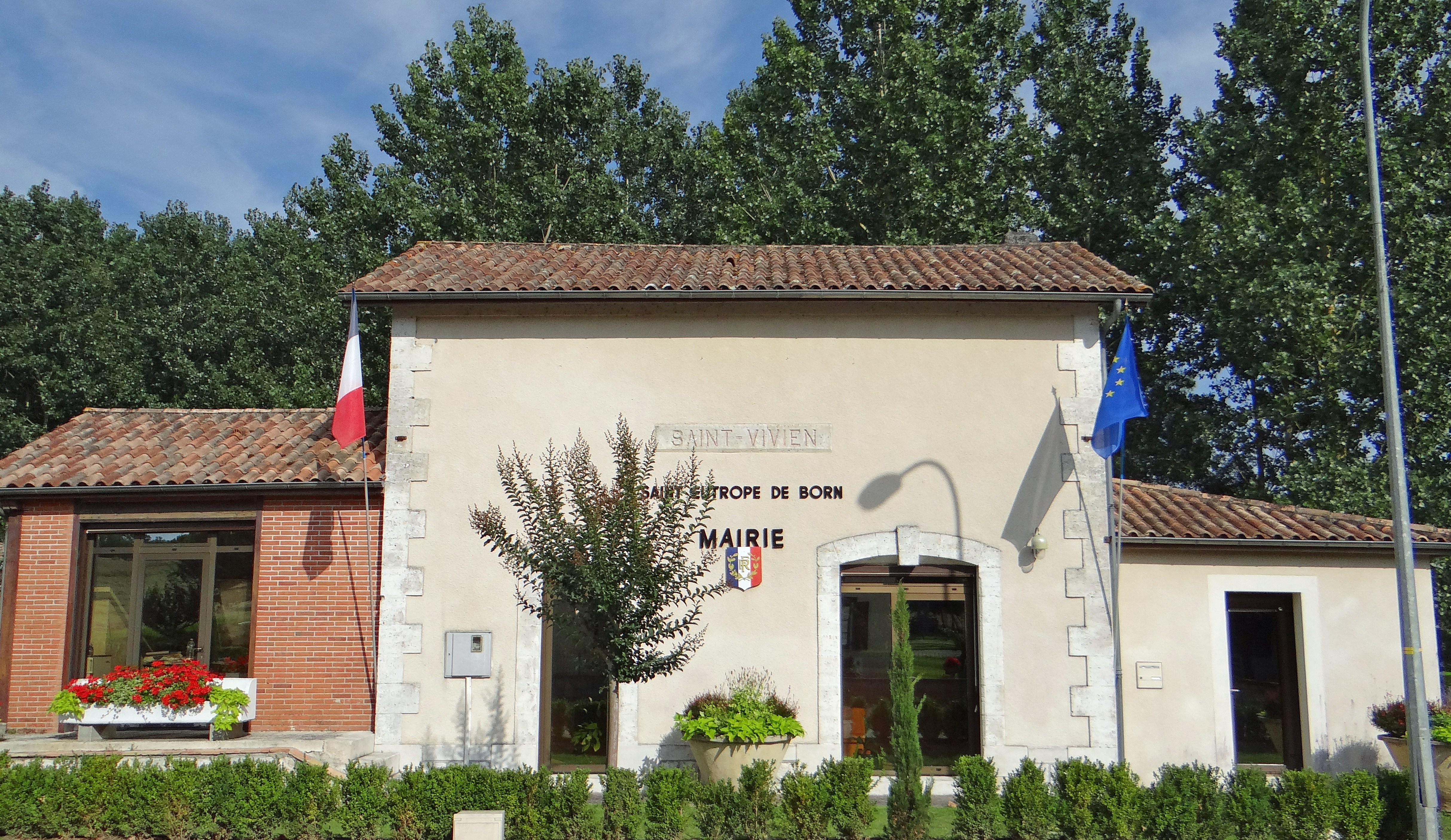 Saint-Eutrope-de-Born - Mairie